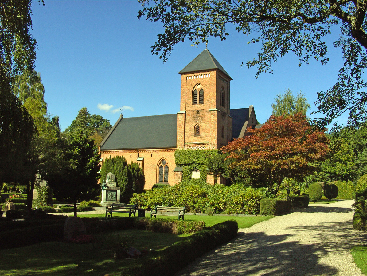 Taarbæk kirke, Lyngby-Taarbæk fra syd